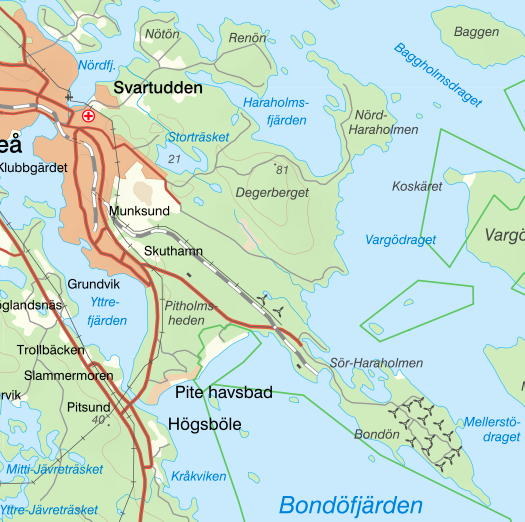 Pitholmen. Utsnitt ur Lantmäteriets topografiska webbkarta. licenssida